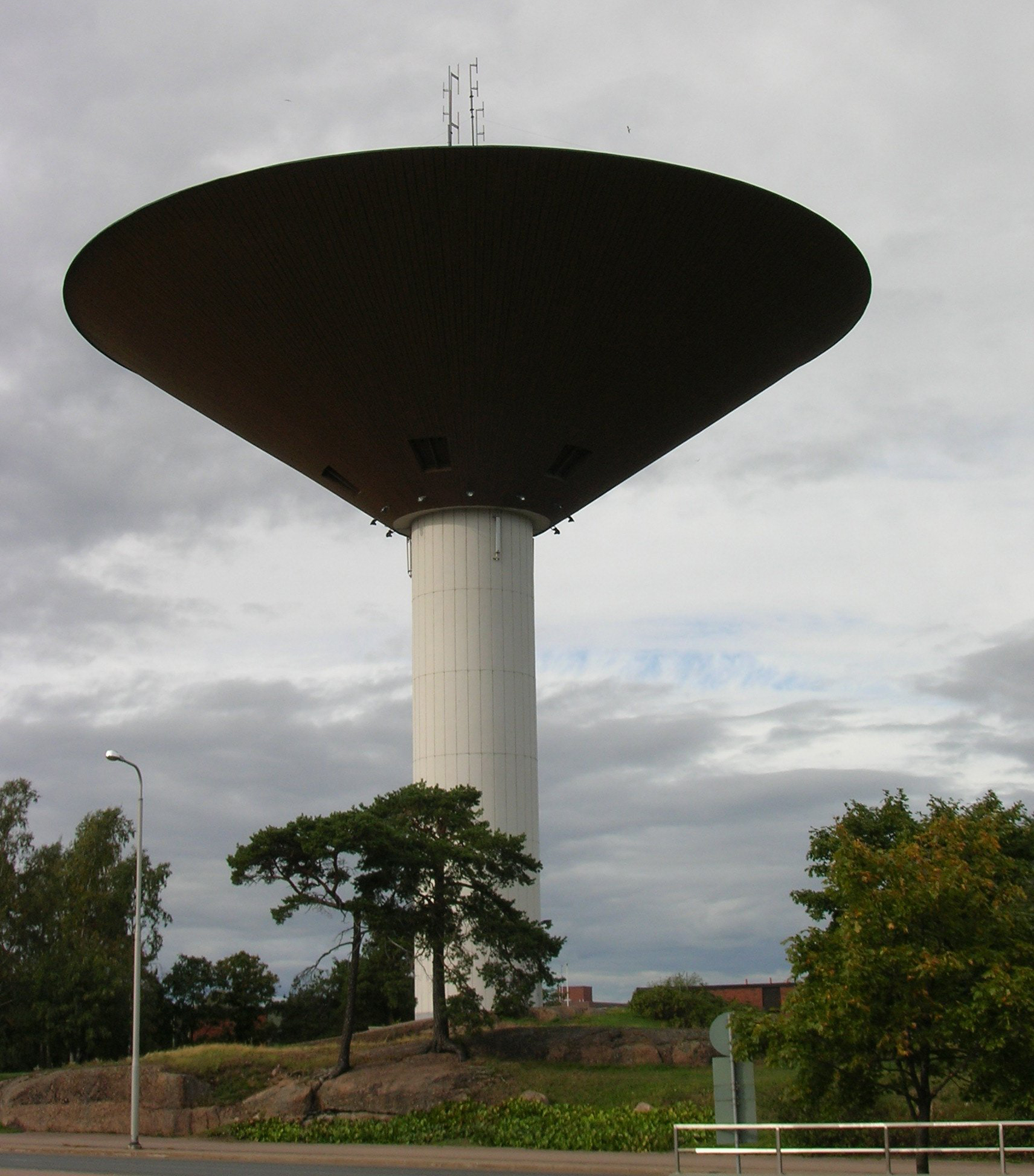 Karhula water tower in Kotka, Finland.